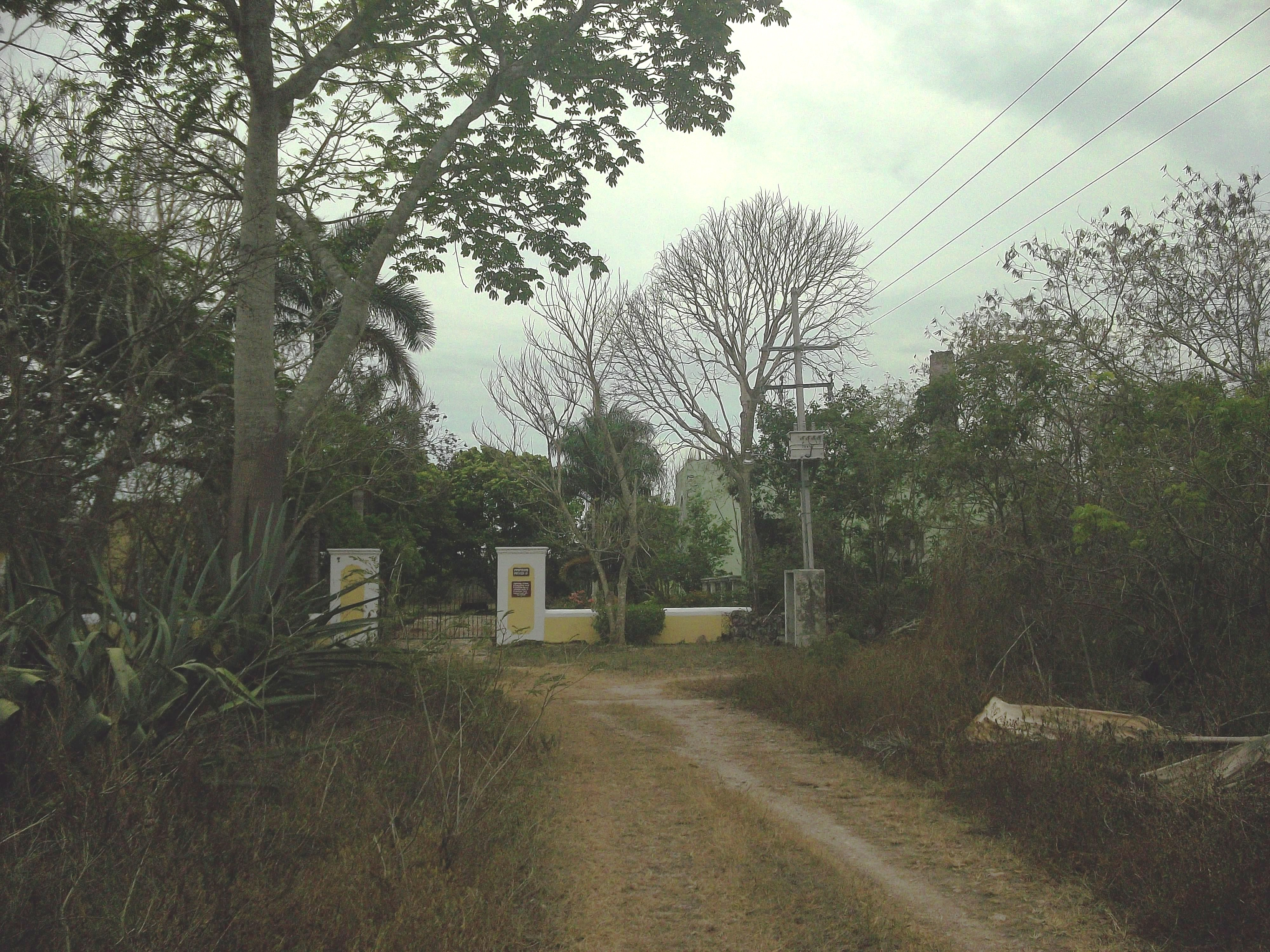 Vista de Kancabchén, Yucatán.